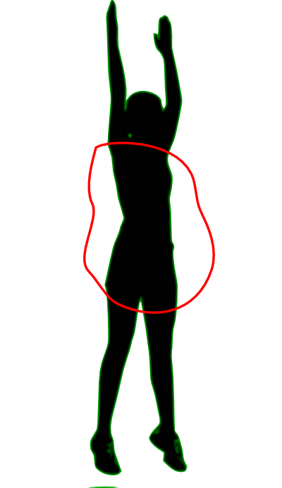 Cilvēka rumpja ilustrācija